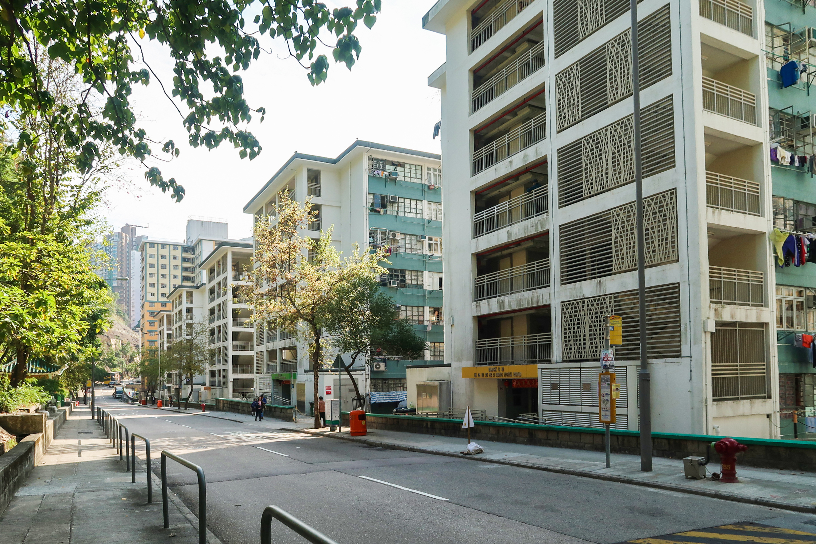 A Kung Ngam Road